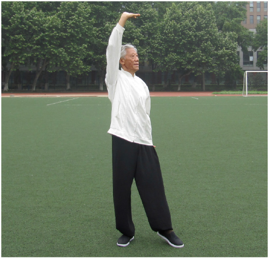 Abschnitt 3: Die Arme einzeln hochheben, um Magen und Milz zu regulieren